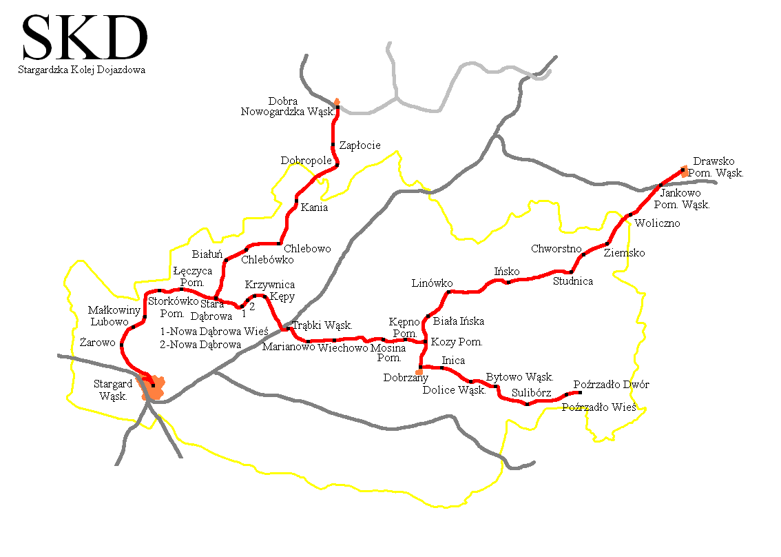 Stargardzka Kolej Dojazdowa map, Polish version - (German: Saatziger Klein Bahn)